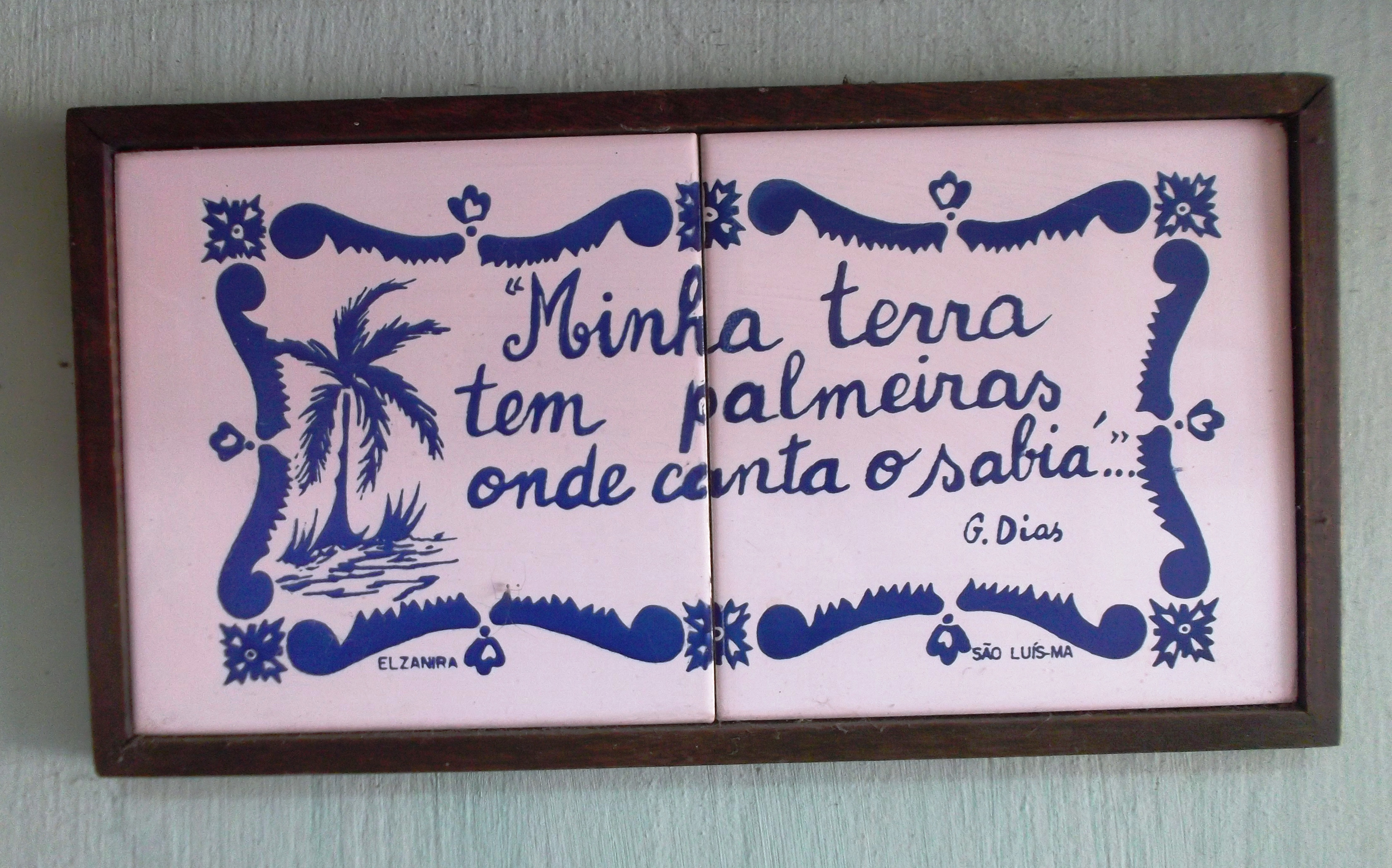 Azulejo com parte da poesia Canção do Exílio, de Gonçalves Dias na decoração da minha casa.